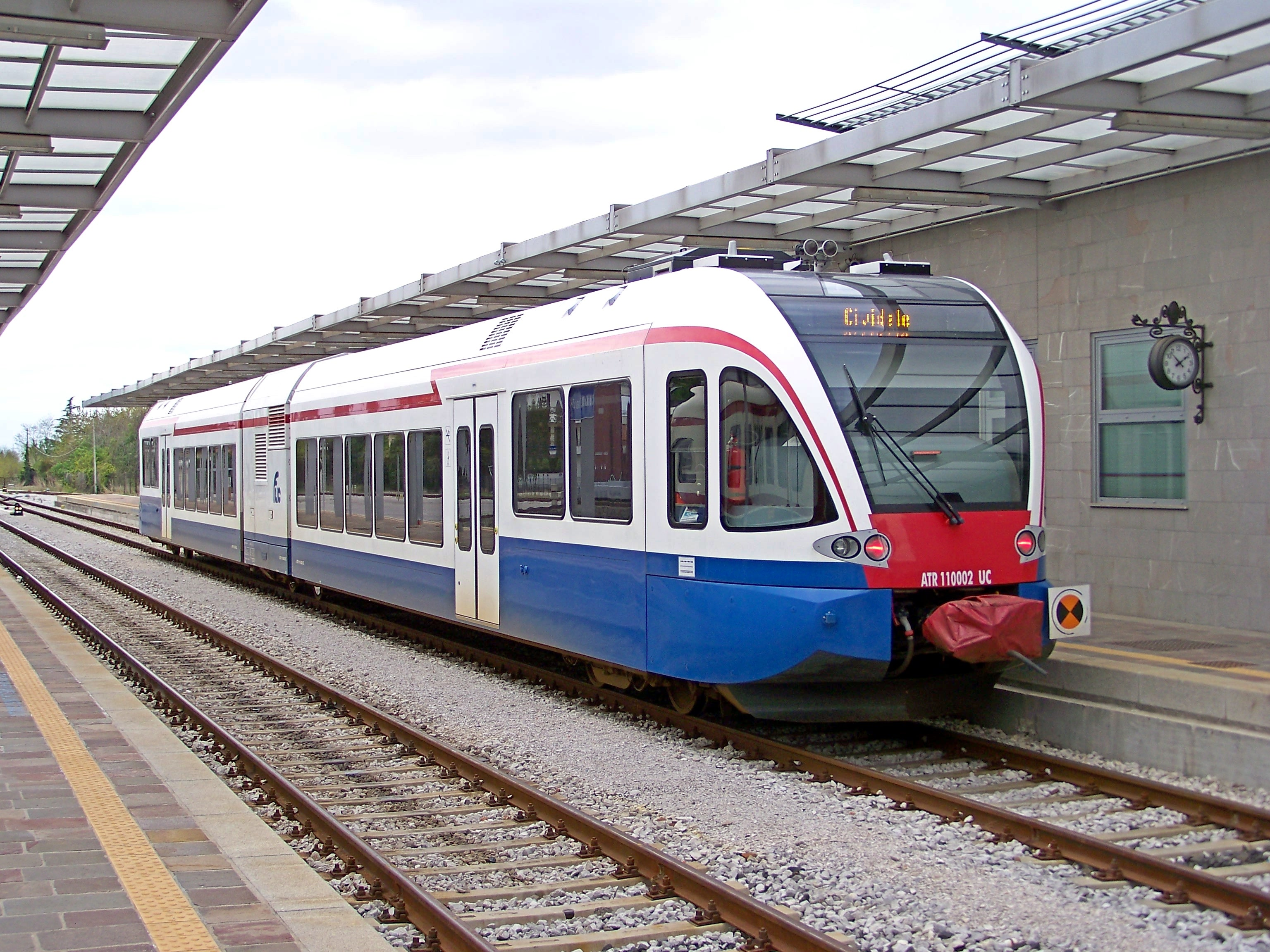 L'ATR 110.002 in sosta sul secondo binario della stazione di Cividale in attesa di effettuare il Regionale AT 67 per Udine.